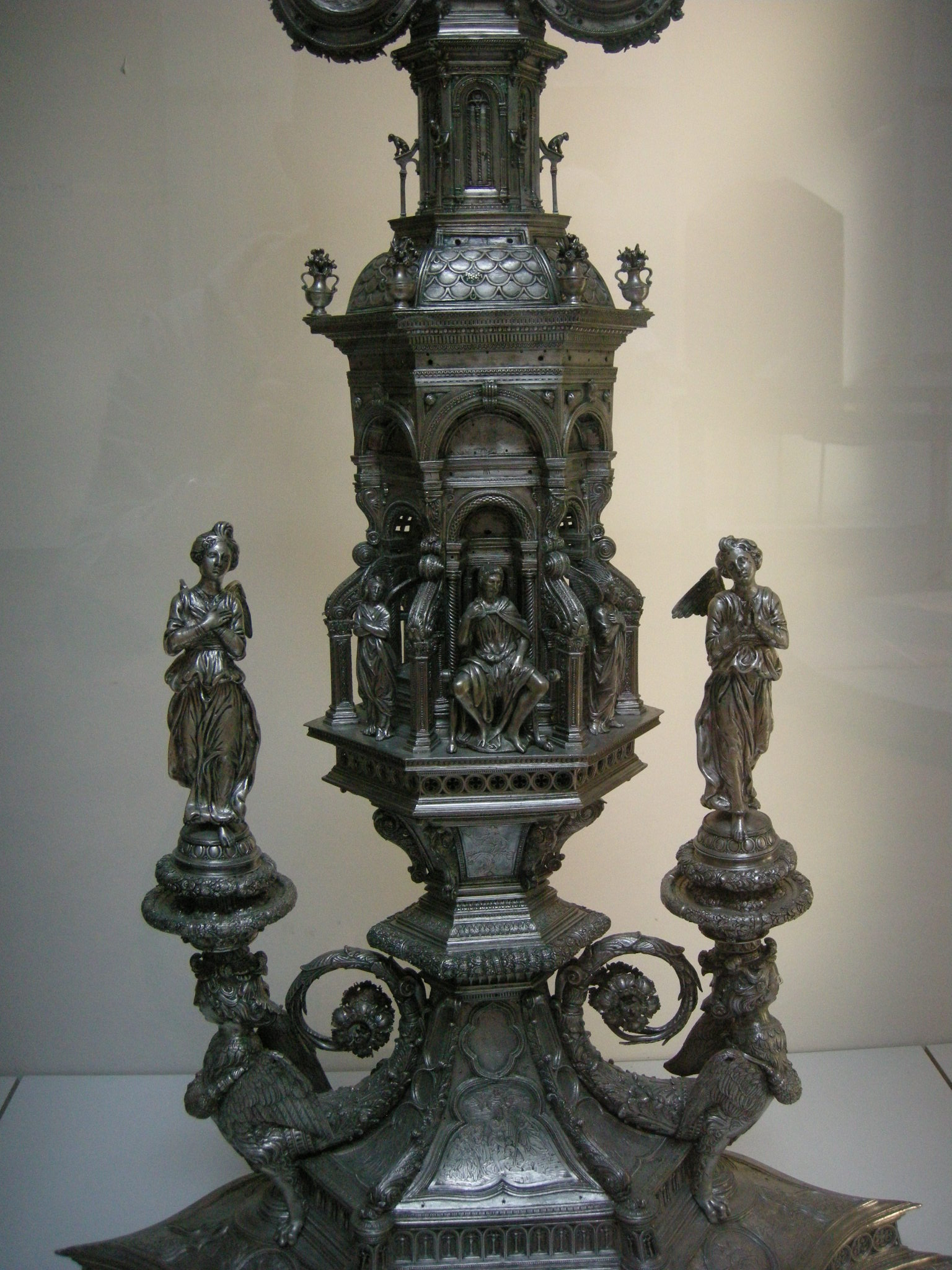 Betto di francesco betti, antonio pollaiolo e domenico dei, croce 1457-59